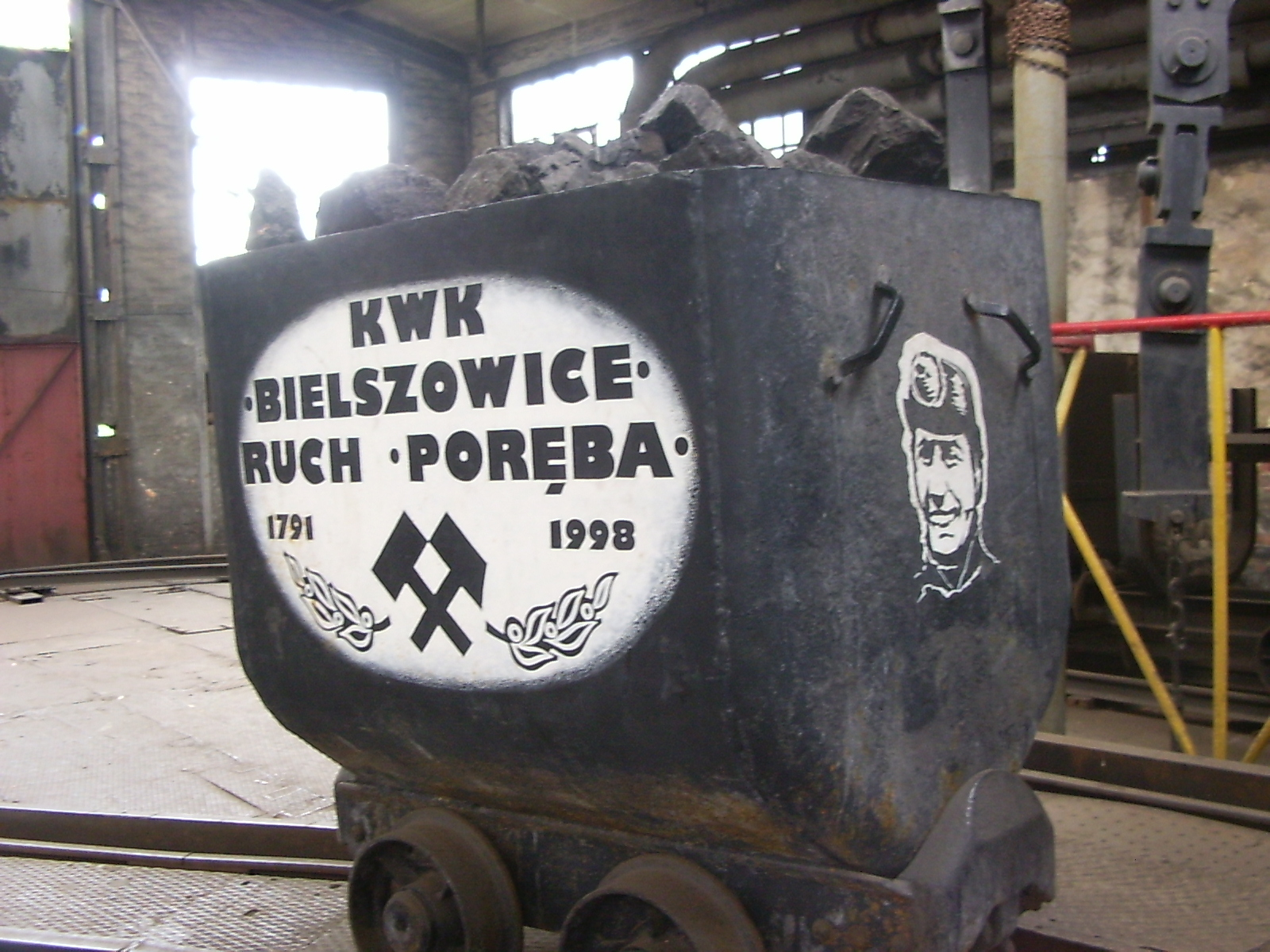 Podobno ostatnia tona węgla wydobyta w czasie normalnego funkcjonowania kopalni